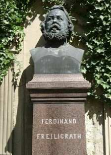 Freiligrath Denkmal in Bad Cannstatt - eigenes Foto vom 24.4.2004 Bild ist unter der GNU FDL zur weiteren Verwendung freigegeben 21:46, 24. Apr 2004 Enslin 224 x 312 (17335 Byte) (Freiligrath Denkmal in Bad Cannstatt - eigenes Foto vom 24.4.2004)